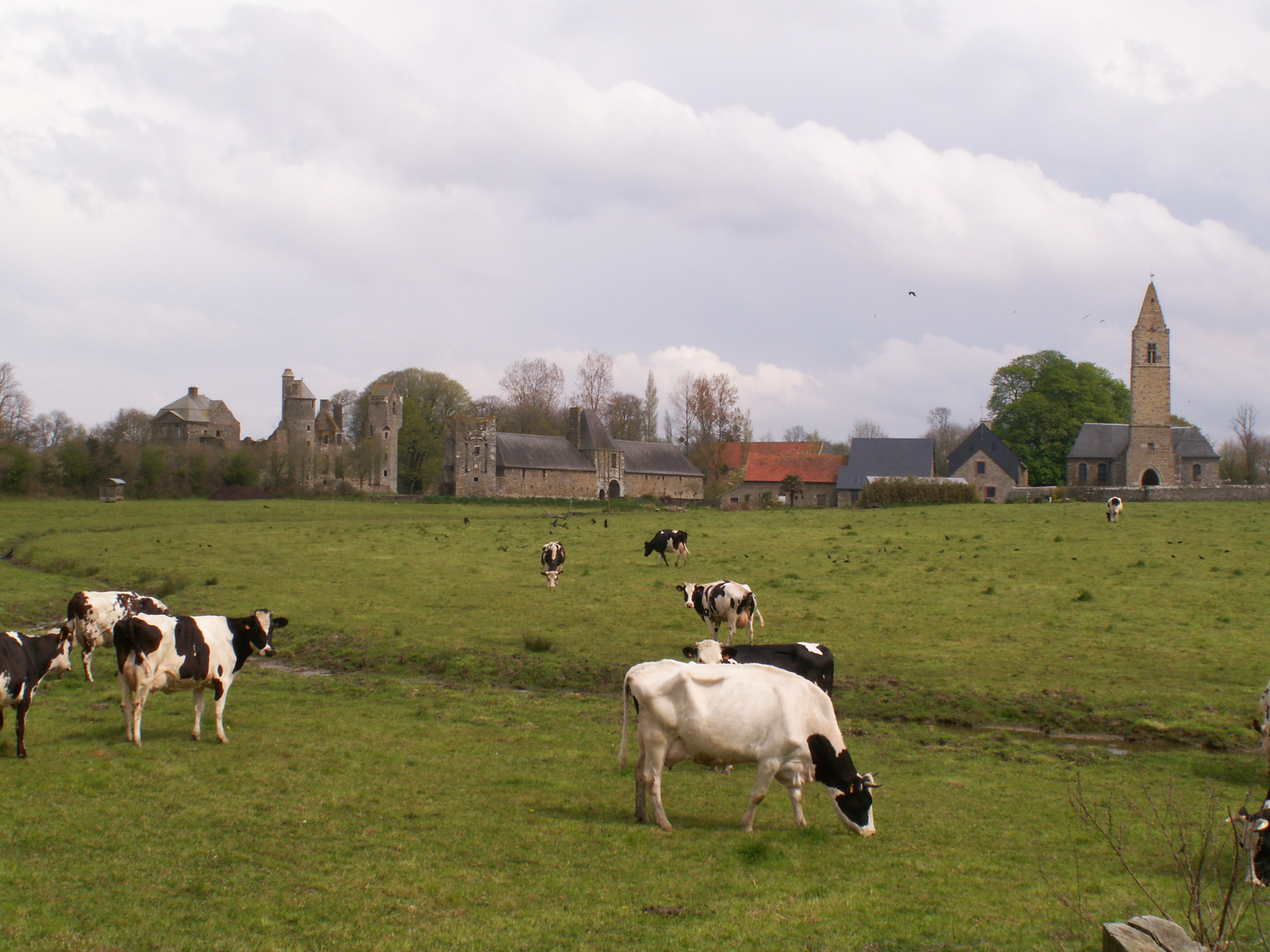 Eglise et château de Gratot, Manche, France